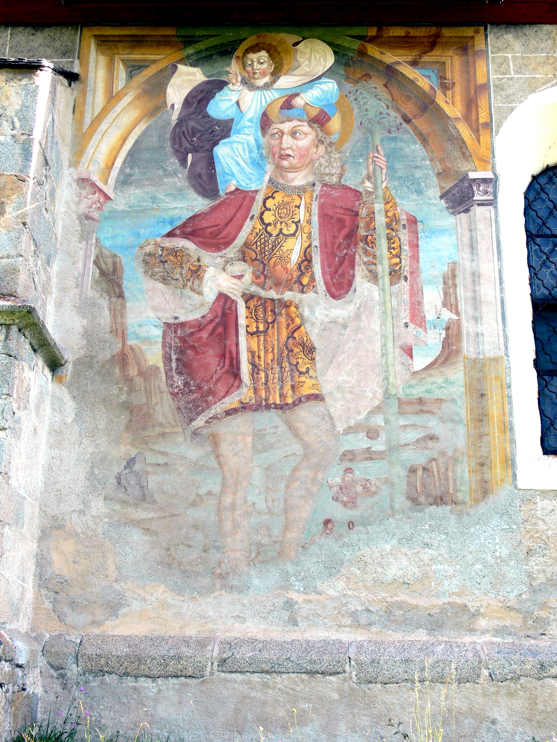 Nasen im Pustertal. Kirche St.Jakob: Christopherus-Fresco von Simon von Taisten